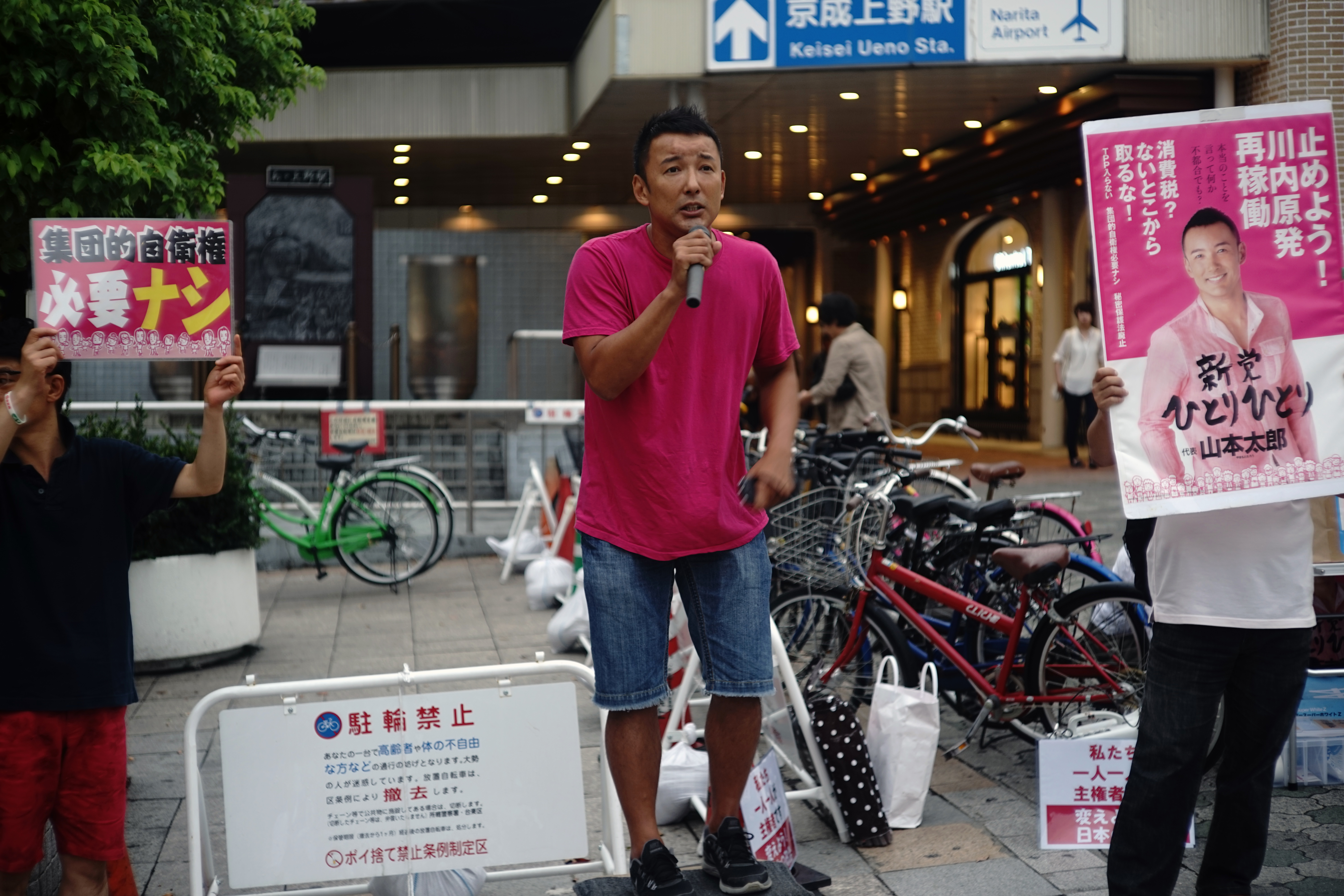 山本太郎参議院議員、街宣